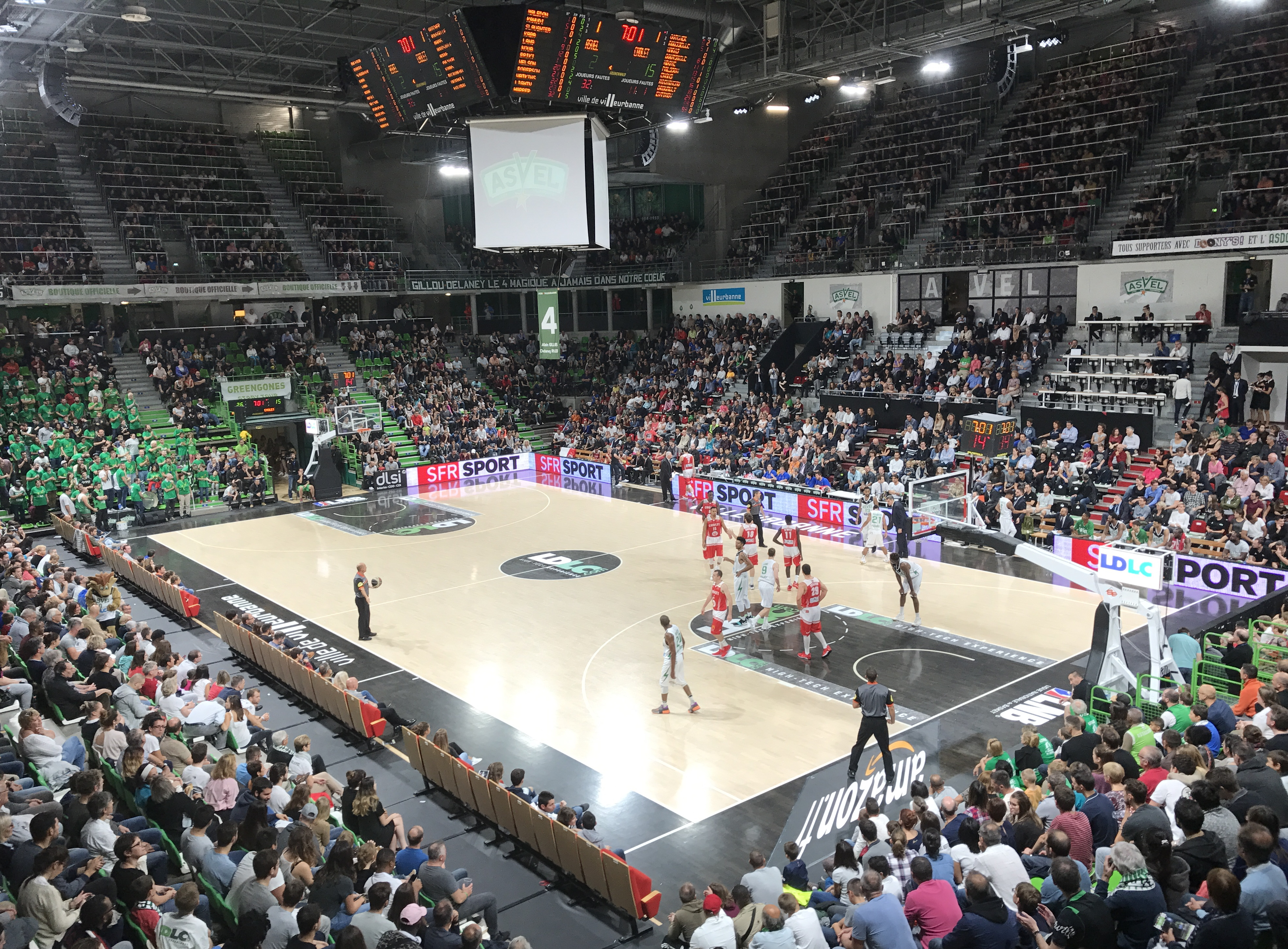 Asvel-Cholet en Pro A de basket-ball à l'Astroballe en septembre 2017.